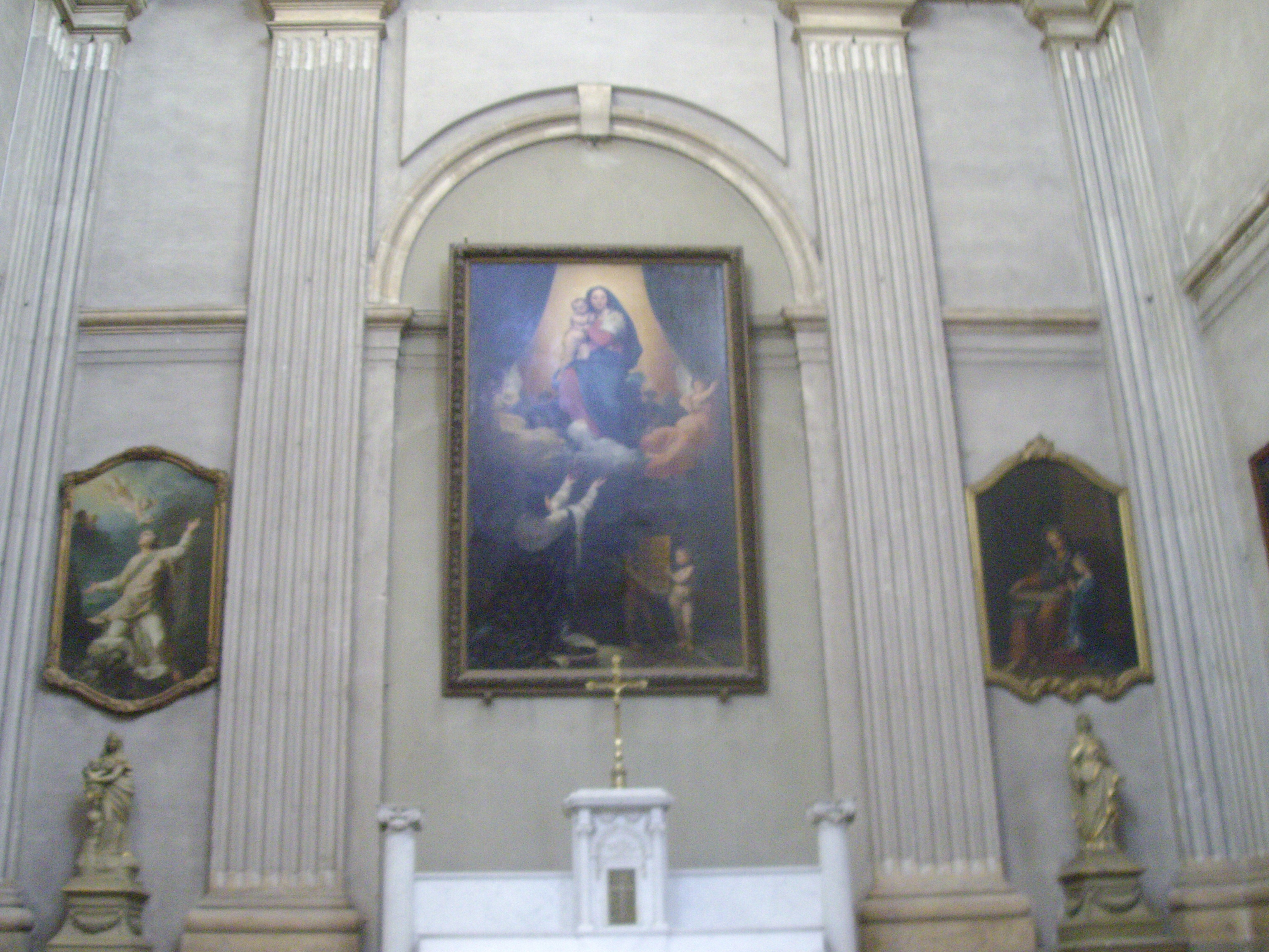 Vue intérieure de la Cathédrale Notre-Dame-de-l'Assomption de Montauban, le Vœu de Louis XIII, de Jean A. D. Ingres .